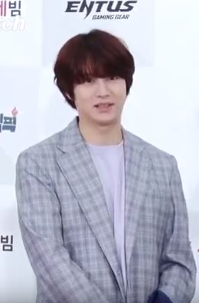 '게임돌림픽 2019:골든카드' 레드카펫이 서울 마포구 상암동 에스플렉스센터 OGN e스타디움에서 열렸다.